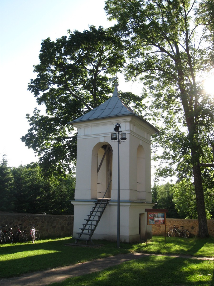 Dzwonnica w Strabli.